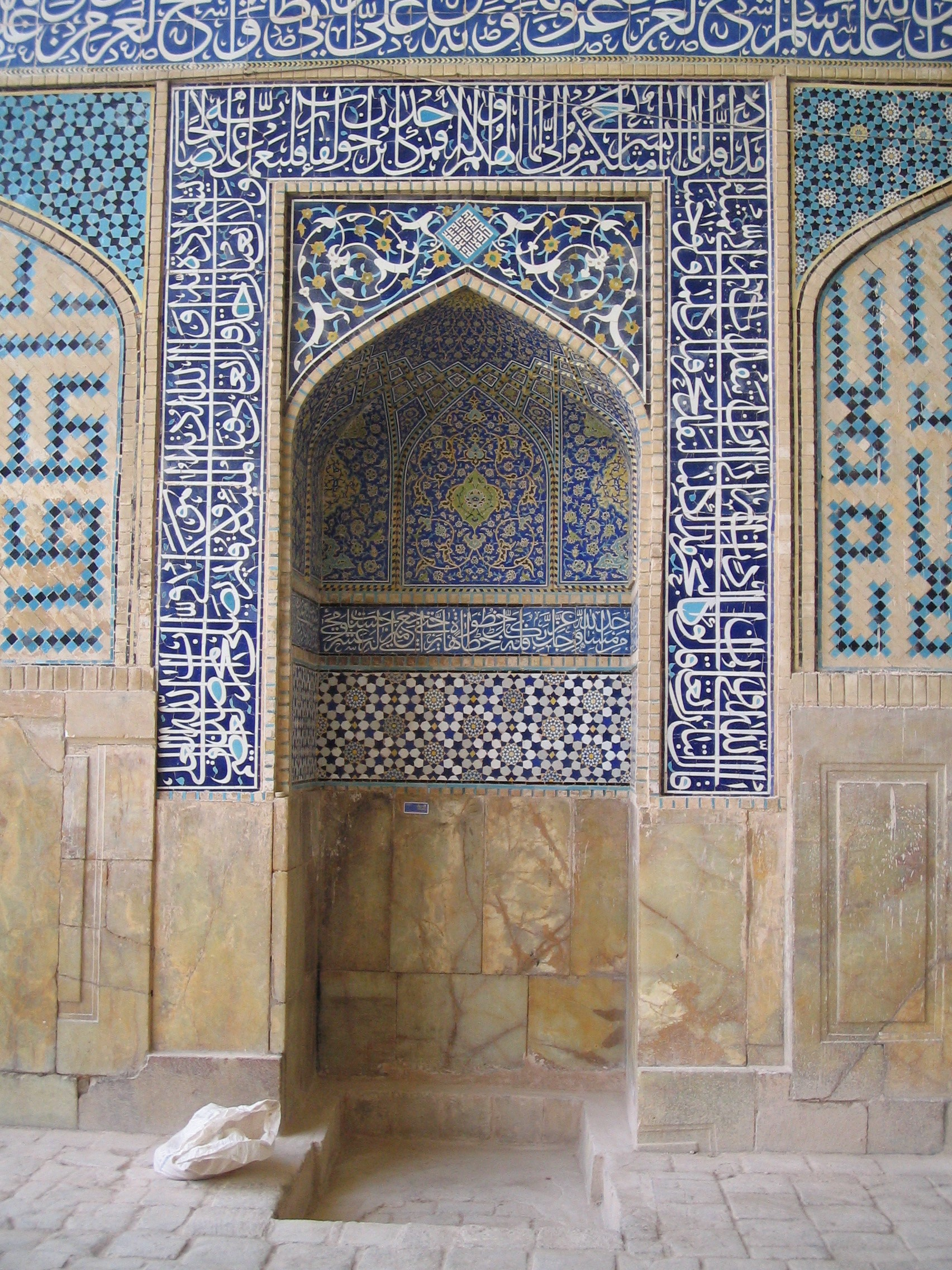 Mehrab in Masjed-e-Jomeh in Esfahan, Iran.